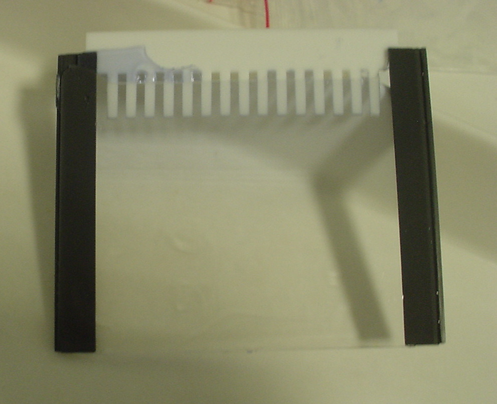 Ein Polyacrylamid-Gel, das sich zwischen Glasplatten befindet. Oben sieht man noch den Teflonkamm, er dient als Platzhalter um die Probentaschen zu bilden, und wird vor dem Probenauftrag rausgezogen.